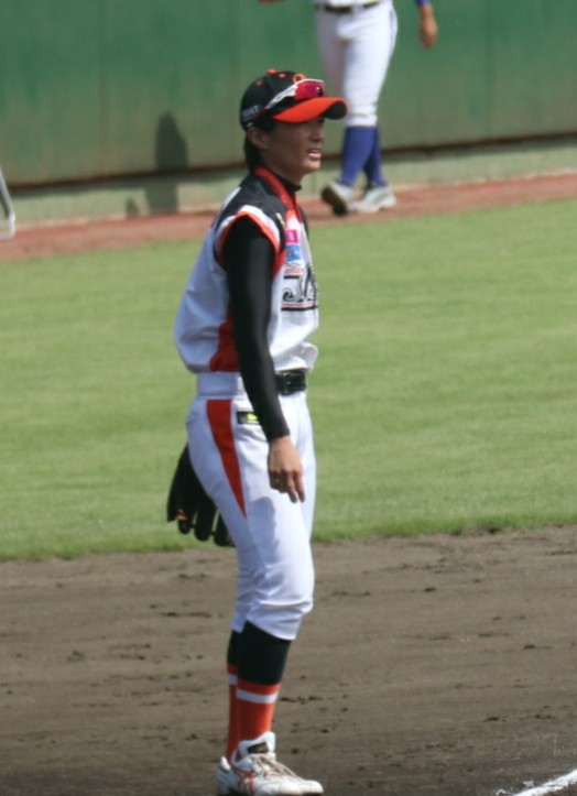 2018年9月 県営大宮球場